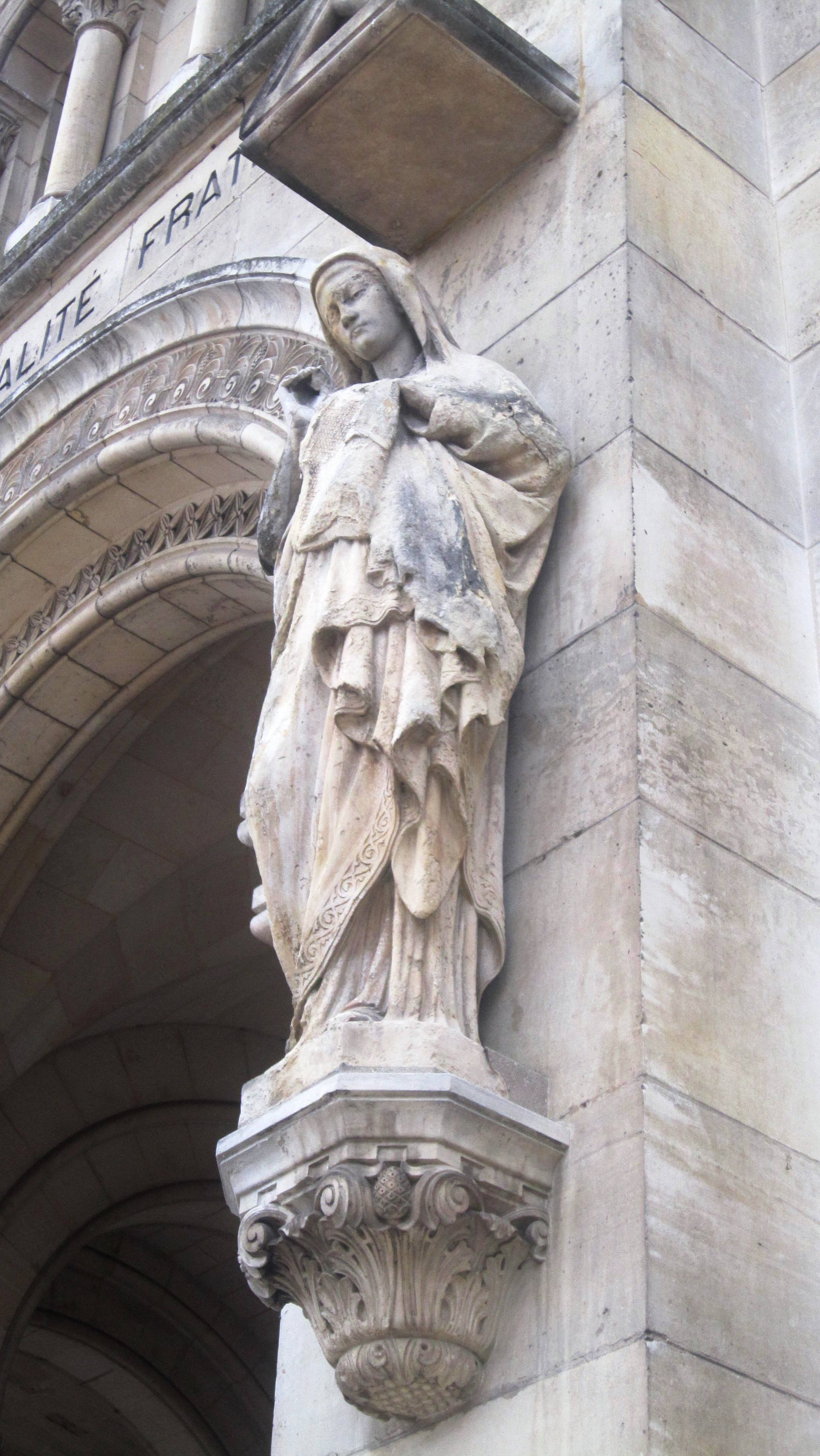 Vierge à la Tunique Basilique Saint-Denys d'Argenteuil